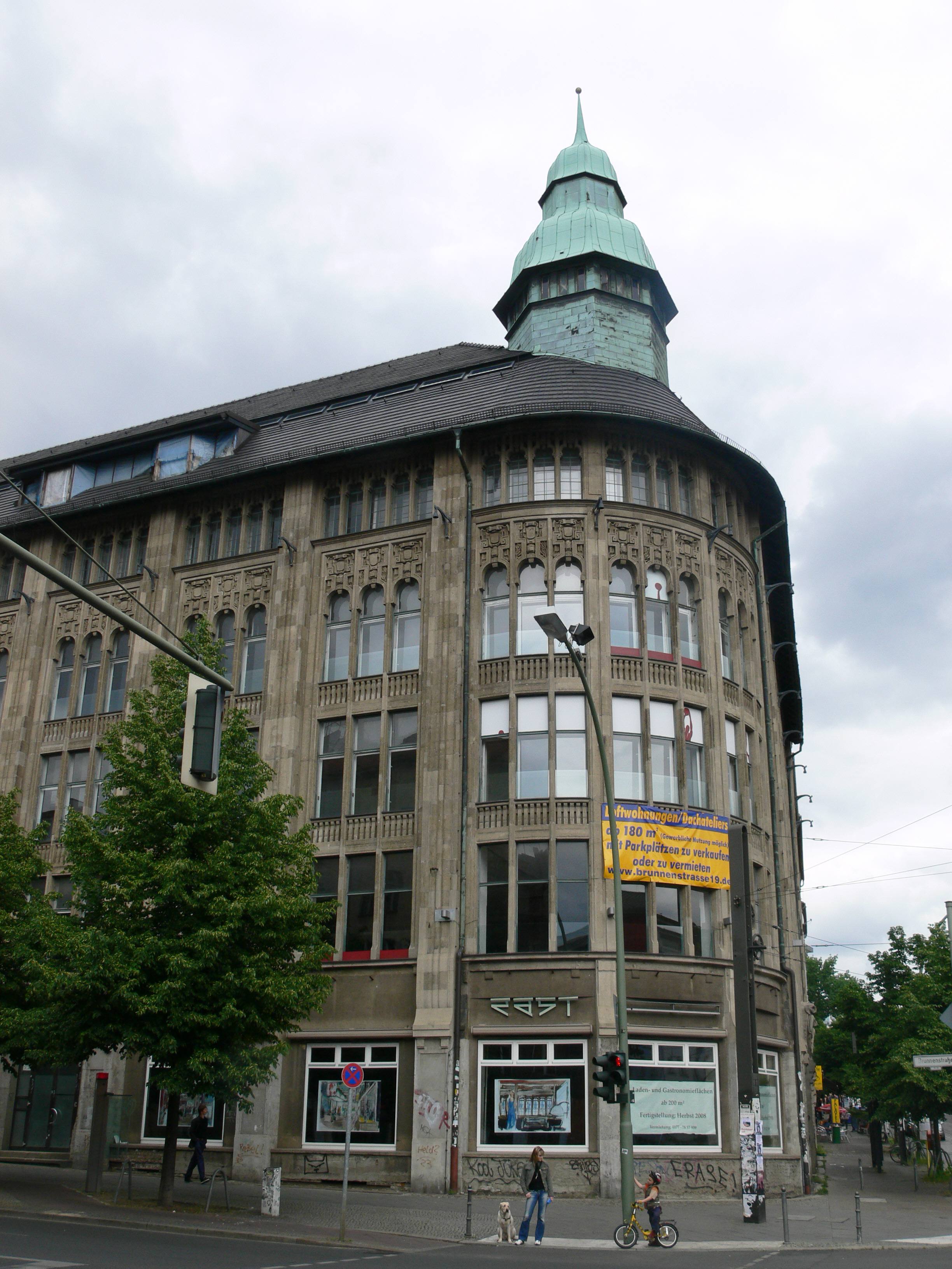 Ehemaliges Kaufhaus Jandorf, Brunnenstraße 19-21, Berlin-Mitte (see [1])